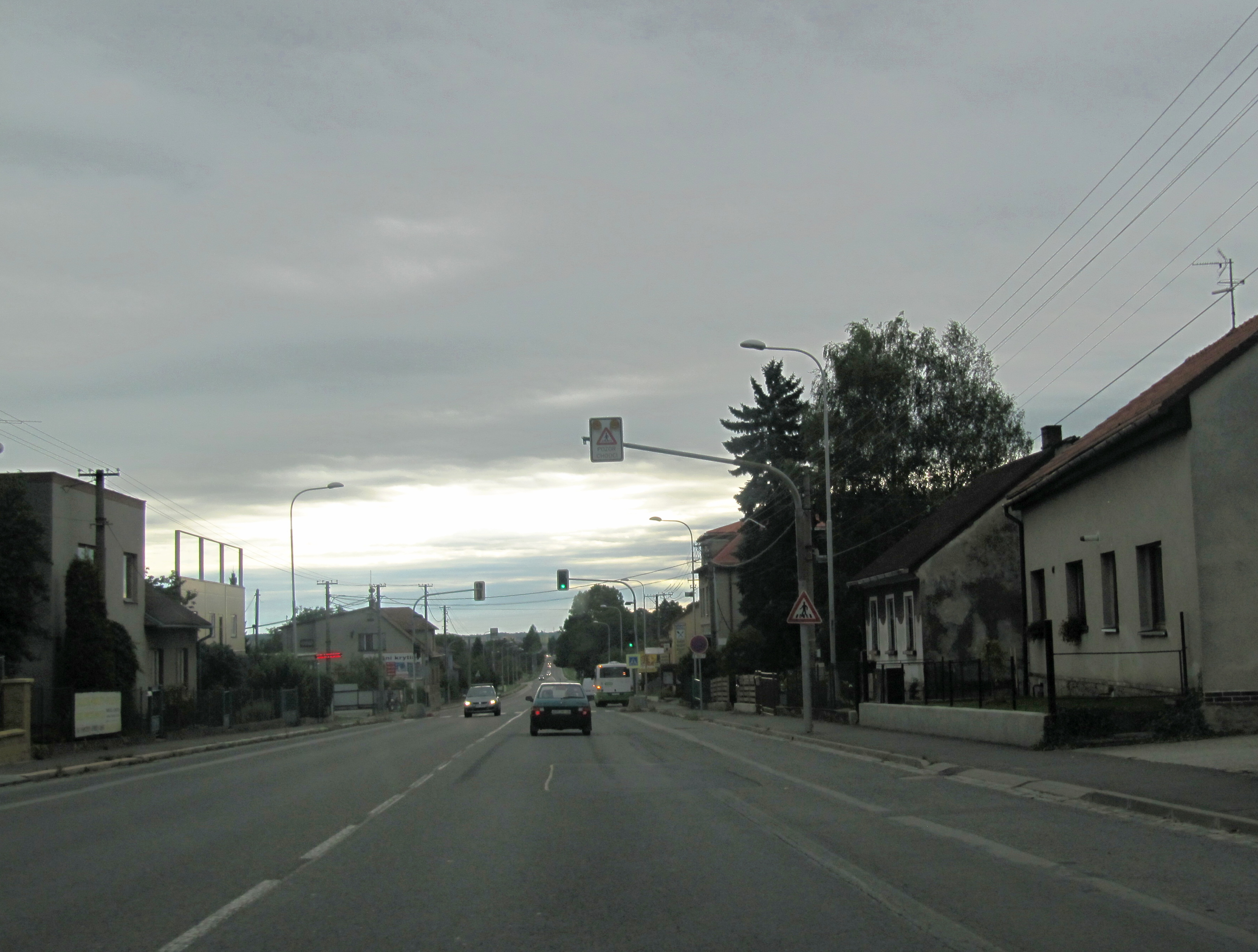 Zelinkovice